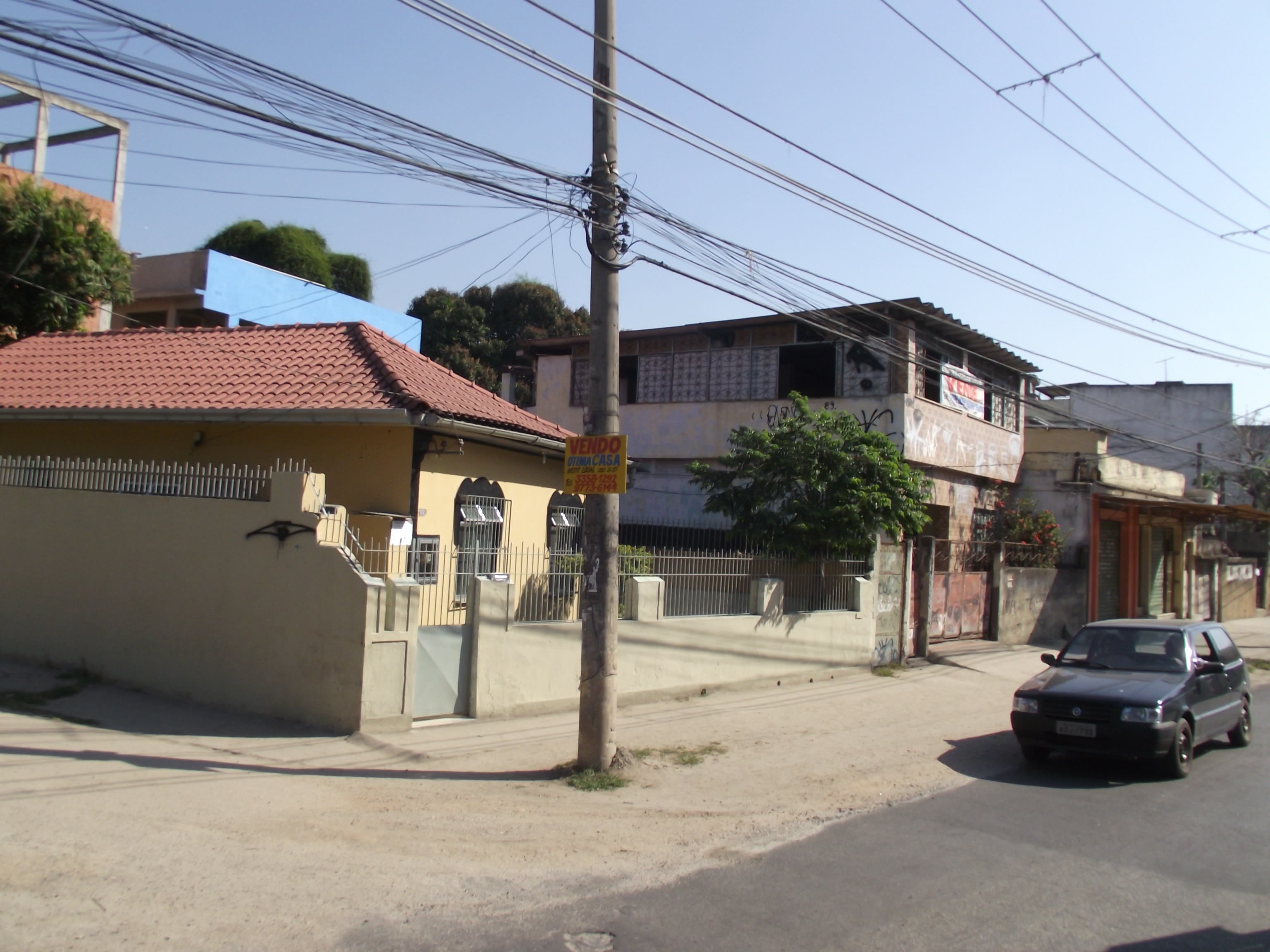 Bairro Engenheiro Belfort, em São João de Meriti, no estado do Rio de Janeiro.